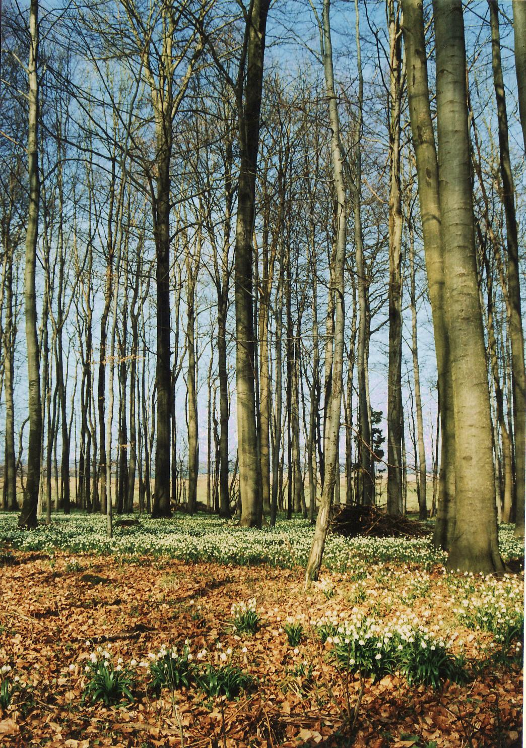 Märzenbecherblüte in einem Buchenwald am Nordrand der Mühlhäuser Hardt.